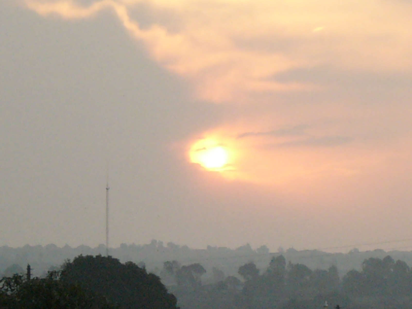 Tarde en Acatlán.